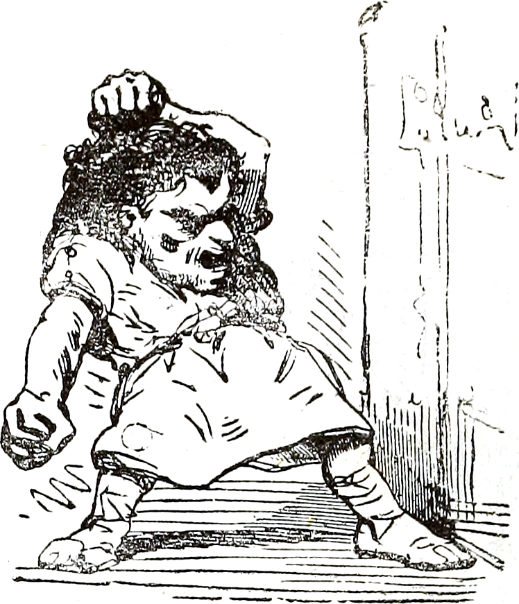 Une illustration pour l’article Kobold dans le Dictionnaire infernal par Collin de Plancy.